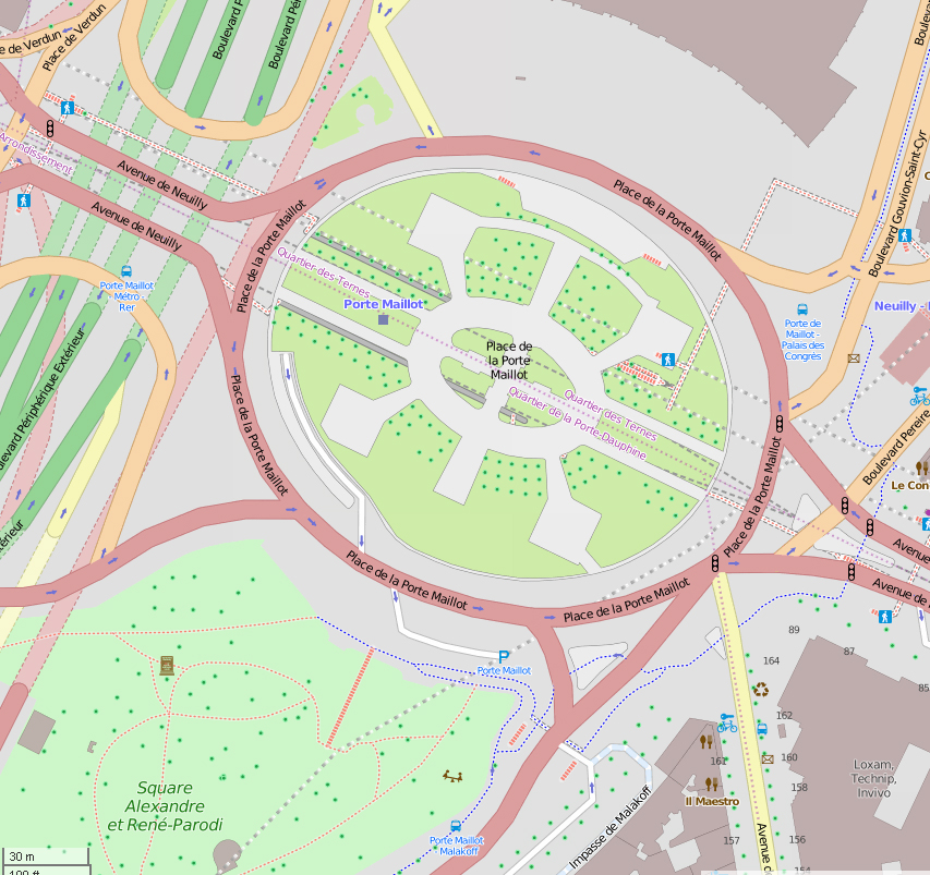 plan OpenStreetMapdde la porte Maillot, et du Jardin Alexandre-Soljenitsyne Paris 16è et 17è